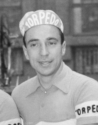 Ploegen van de Ronde van Nederland aan de start, Duitse (Torpedo) ploeg